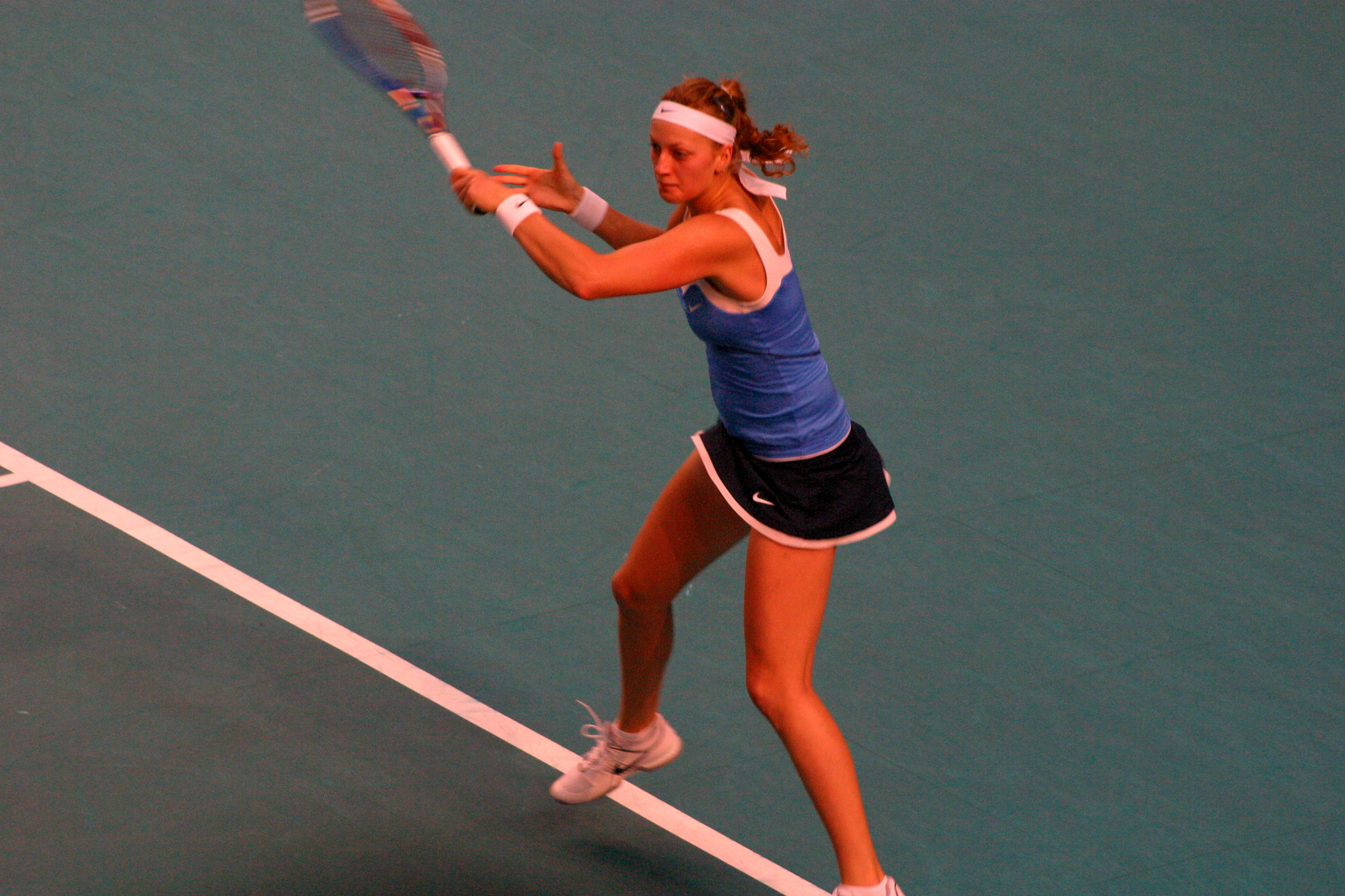 Petra Kvitova en demi-finale de l'open Gdf Suez